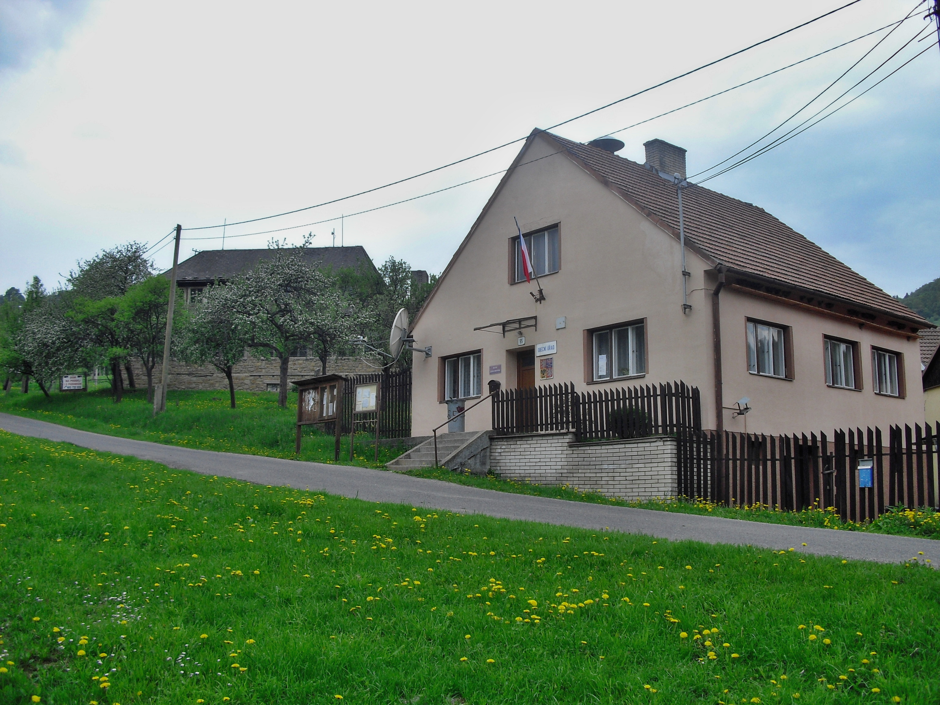 Vyškovec, okres Uherské Hradiště